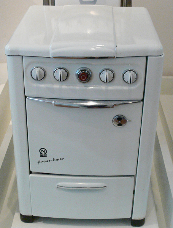 Elektroherd „Arcus super“, Hersteller: Neff, Bretten, 1957 (Kaufpreis 1957: um 300 DM) Landesmuseum Württemberg (Außenstelle Museum für Volkskultur in Württemberg, Waldenbuch) 2.3. Inv. Nr. LVK 1990/117 (Leihgabe der Fam. Backes, Hetzerath)